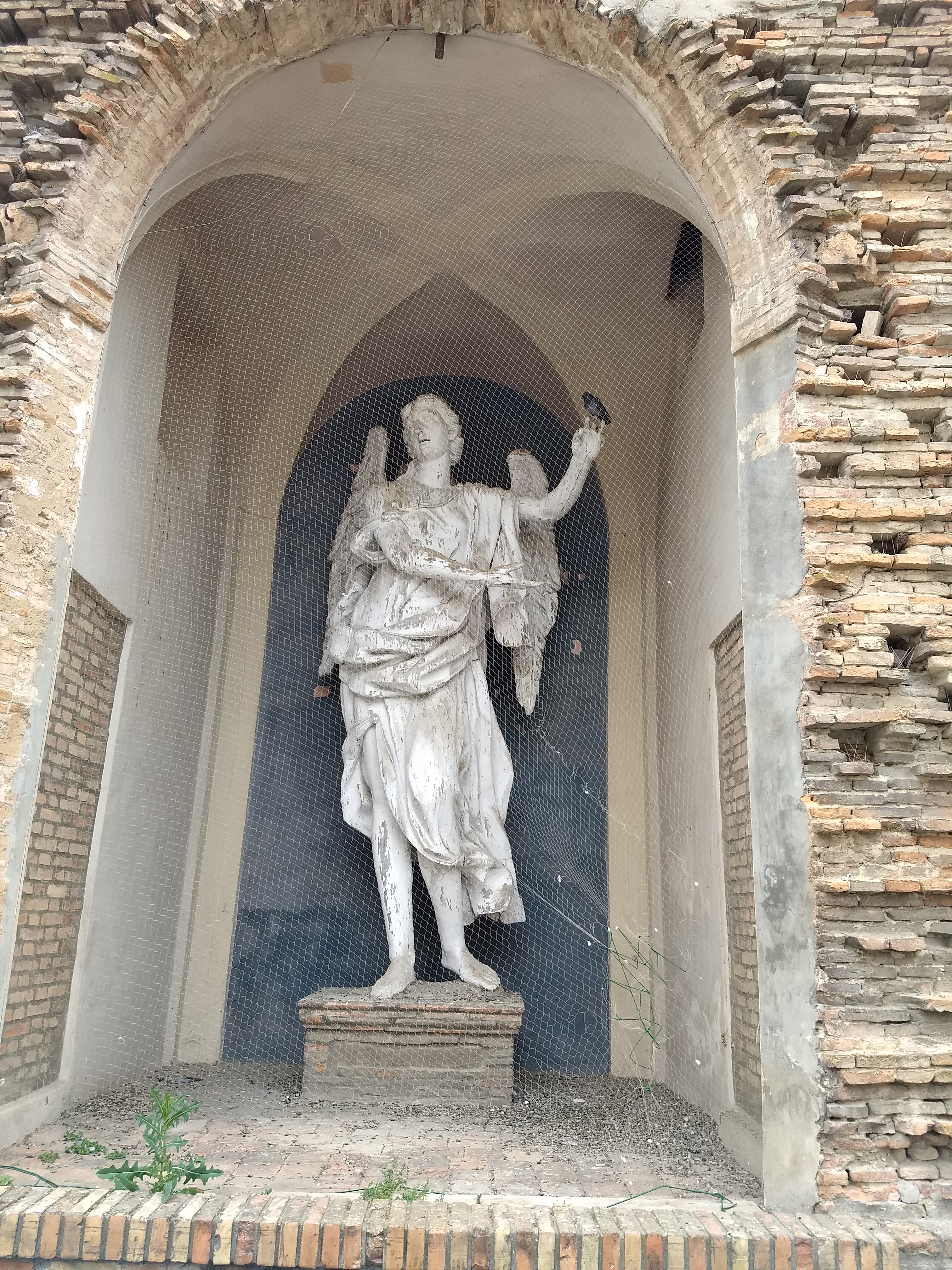 Statua in legno verniciato raffigurante l'Arcangelo Michele, attualmente posizionata in una nicchia dell'ampio piazzale di pertinenza del Palazzo Prati, accessibile da Via Dall'Aste (Forlì).